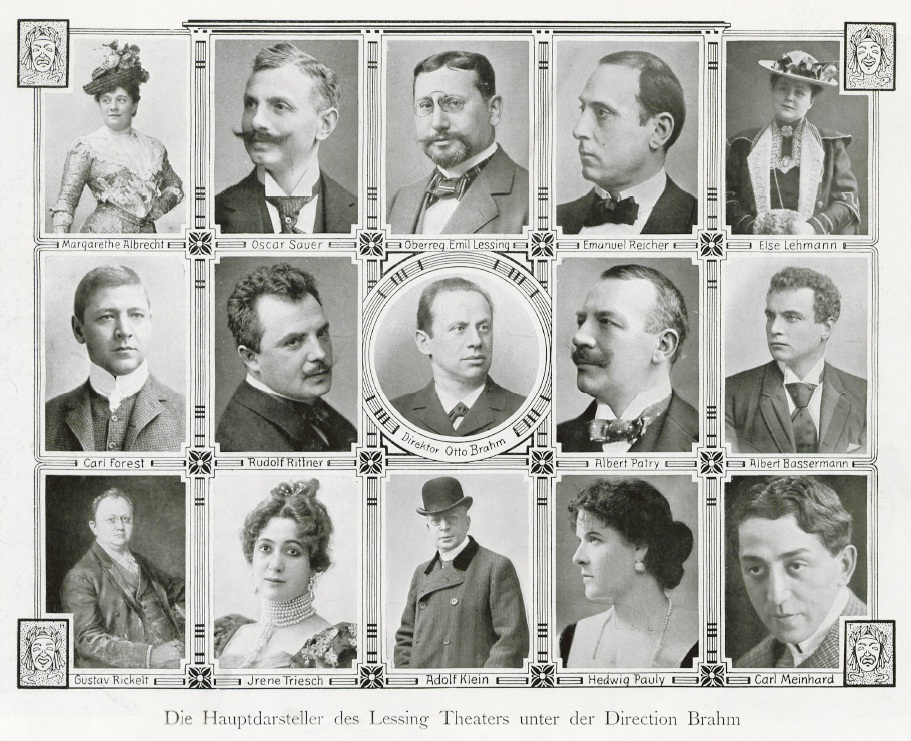 Die Hauptdarsteller des Berliner Lessing-Theaters unter der Direktion von Otto Brahm.